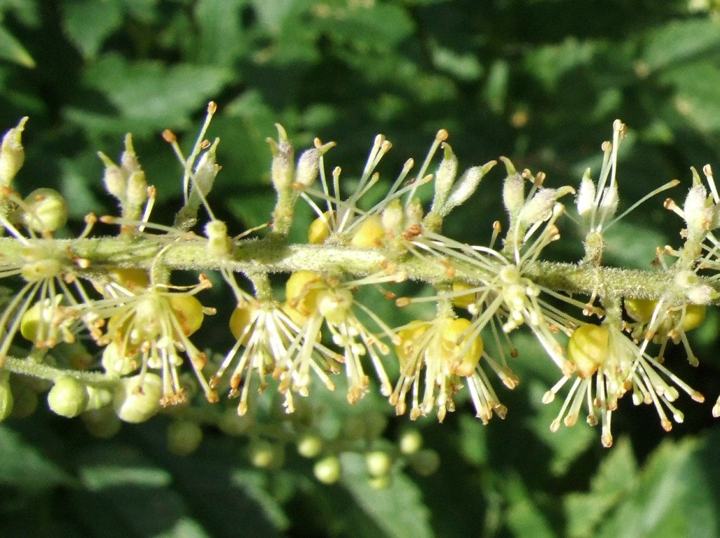 Cimicifuga europaea